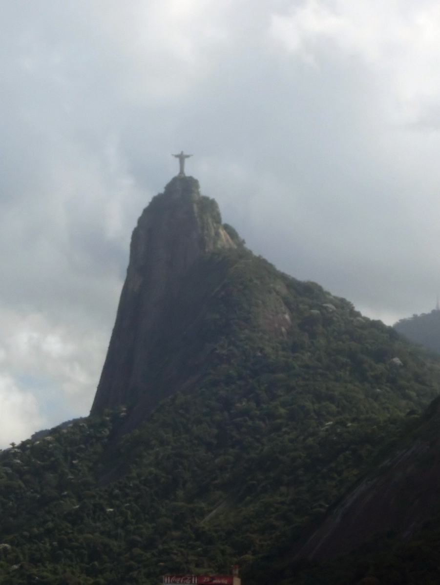 Cristo Redentor visto da Urca.